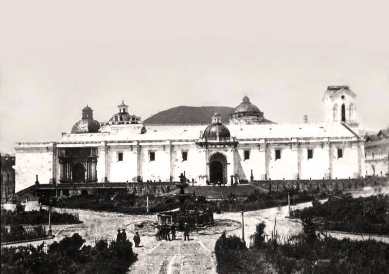 Plaza Grande de Quito con énfasis en la Catedral Metropolitana, alrededor de 1870. Imagen posterior al terremoto de 1870 pues se aprecia el campanario venido abajo.